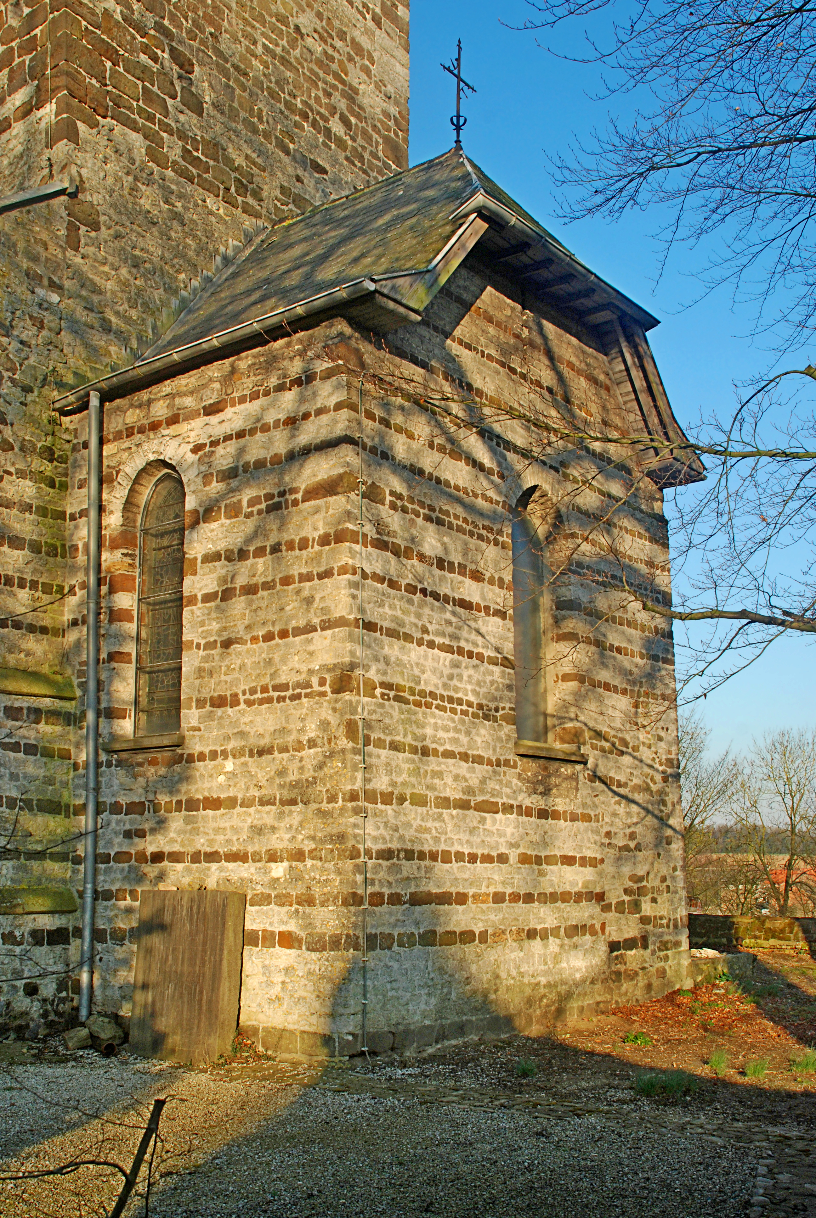 Belgique - Brabant wallon - Chaumont-Gistoux - Église Saint-Bavon de Chaumont